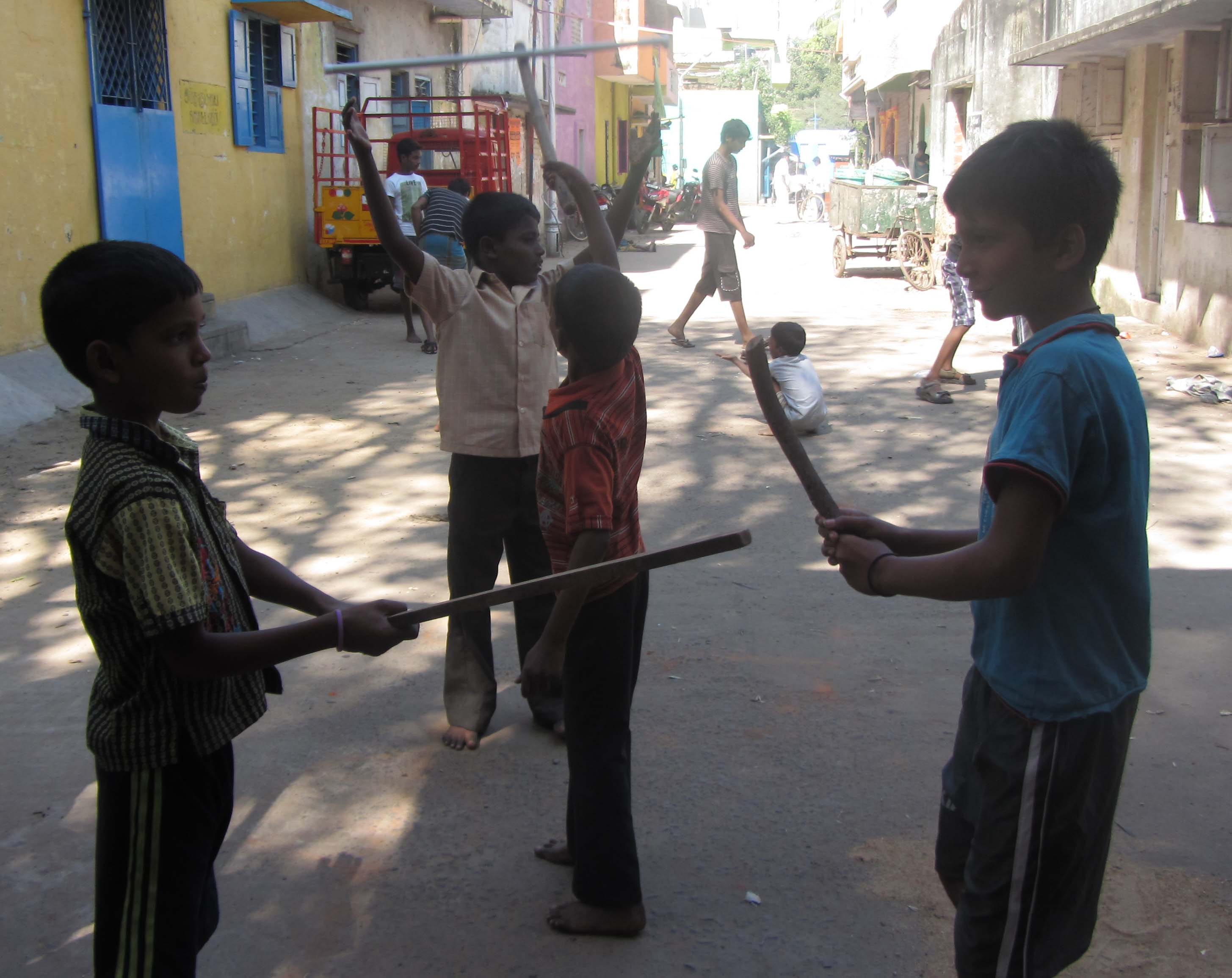 காக்கா கம்பு விளையாட்டு.